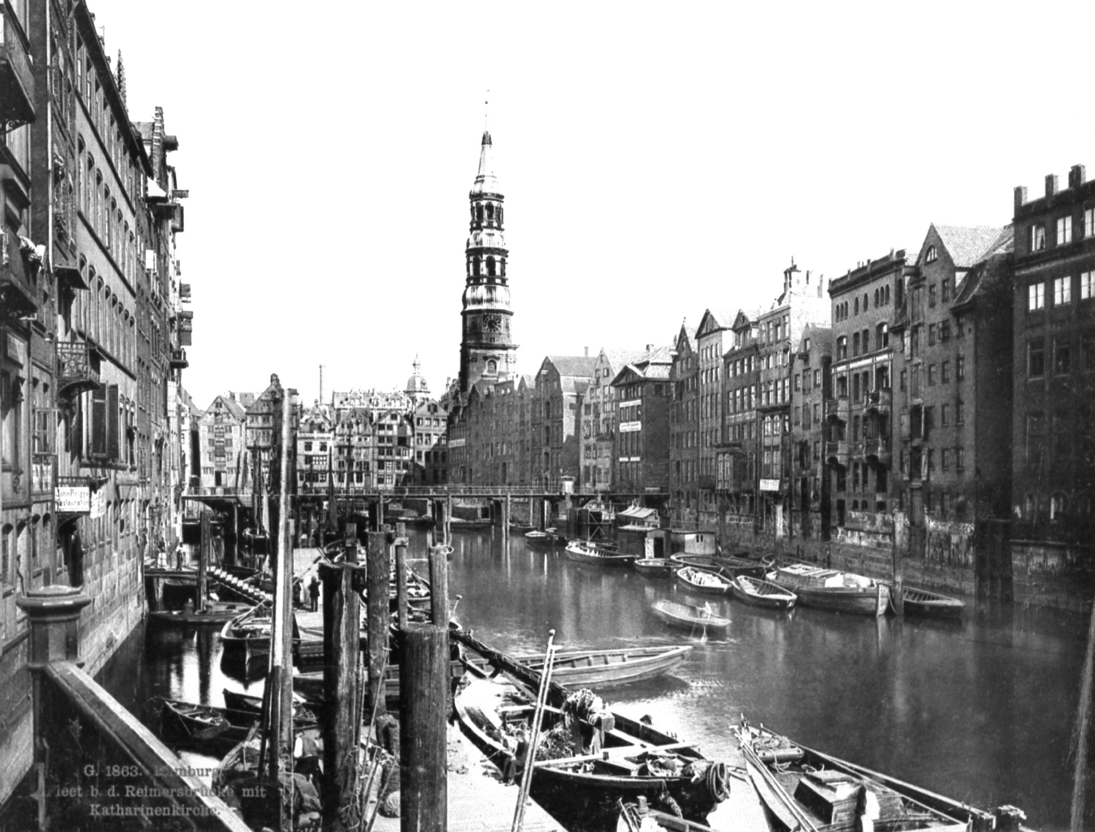 Nicolaifleet in der Hamburger Altstadt mit Reimersbrücke und Katharinenkirche im Jahr 1863. This is a photograph of an architectural monument.